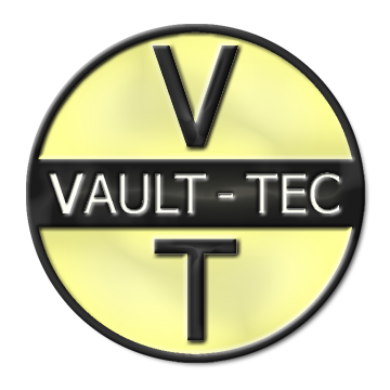 Logotipo de Vault Tec en Fallout 3